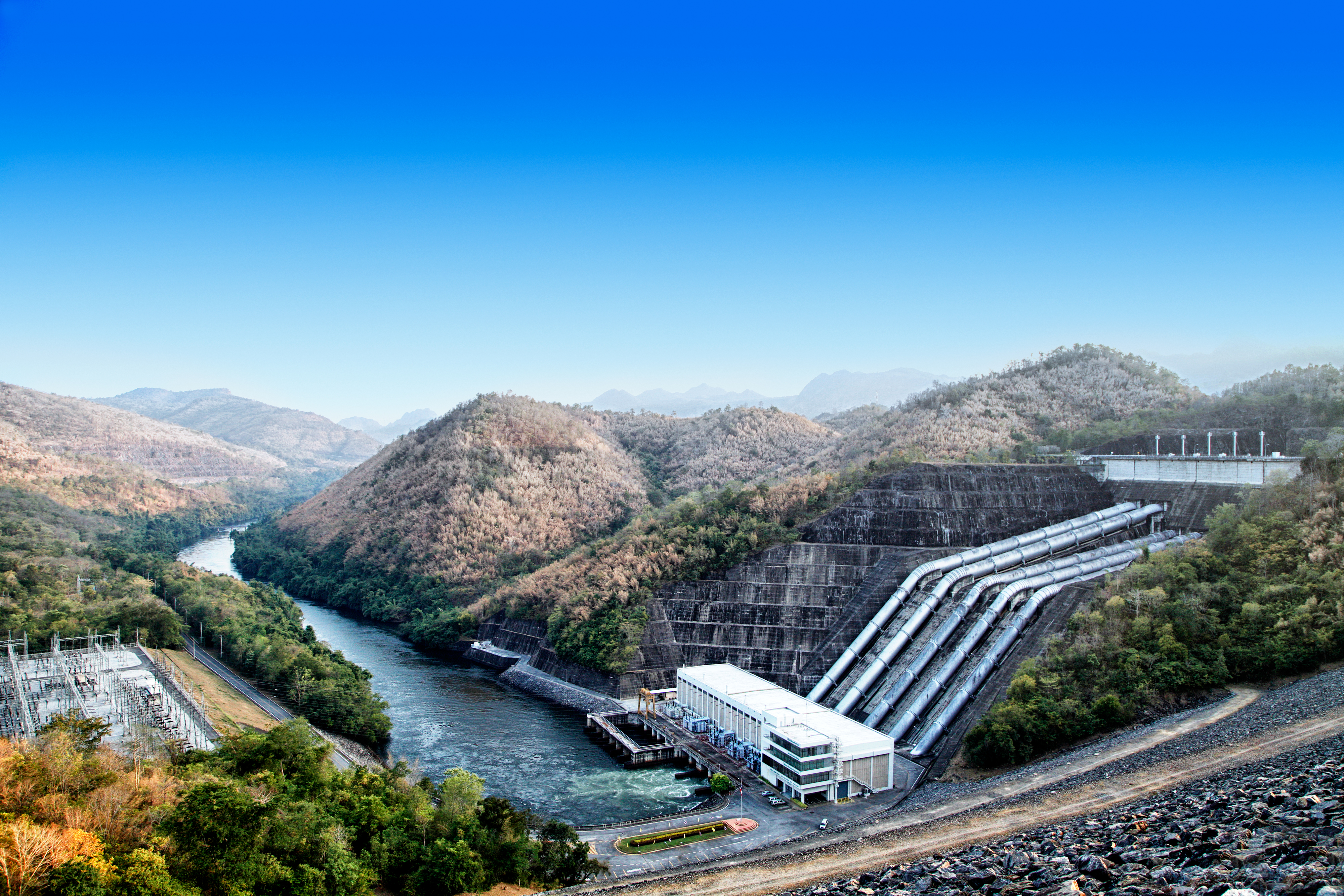 อุทยานแห่งชาติเขื่อนศรีนครินทร์